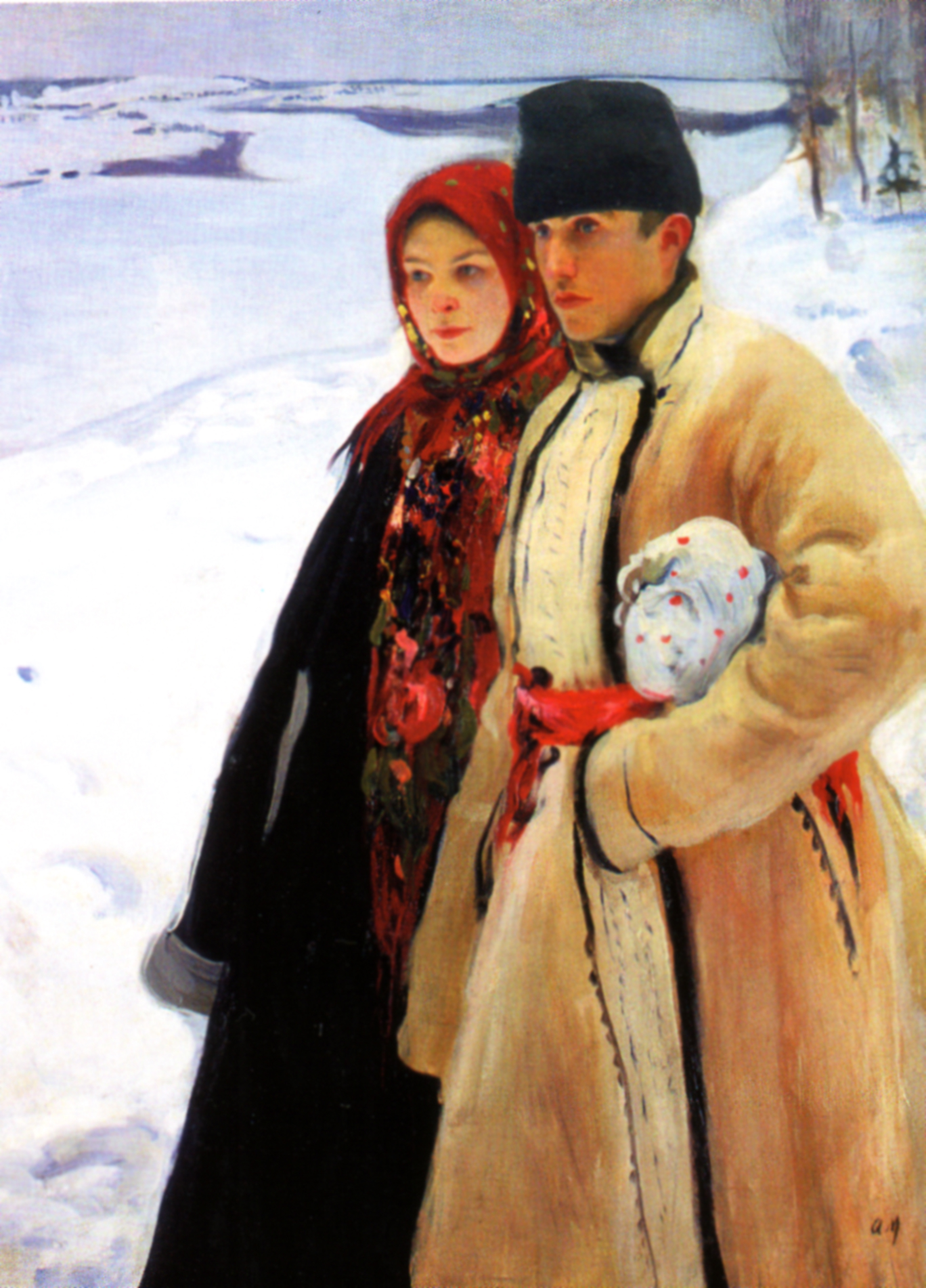 Ukrainian: Зимаtitle QS:P1476,uk:"Зима" label QS:Luk,"Зима" label QS:Lru,"Зима."